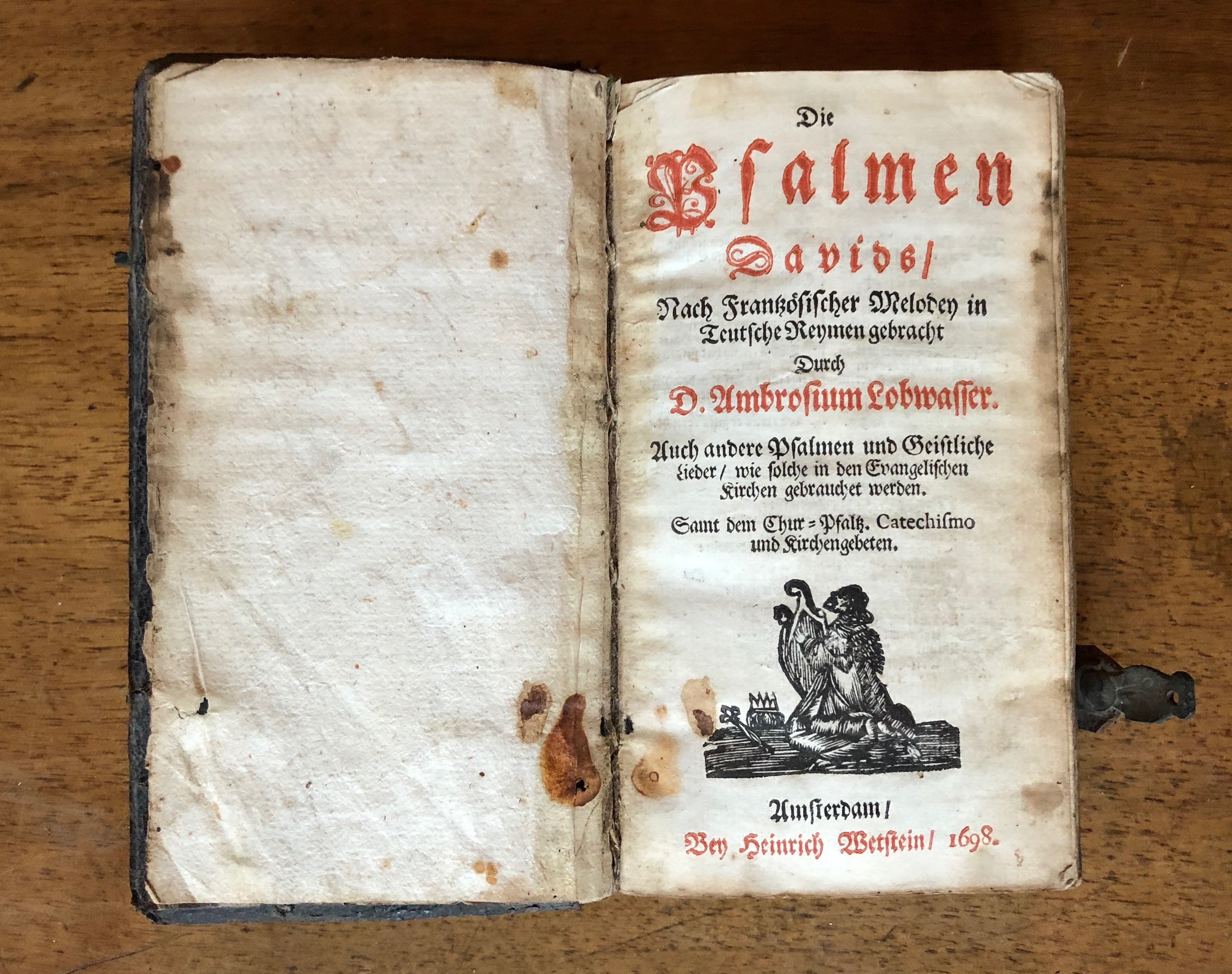 Ambrosius Lobwasser: „Pslamen Davids“